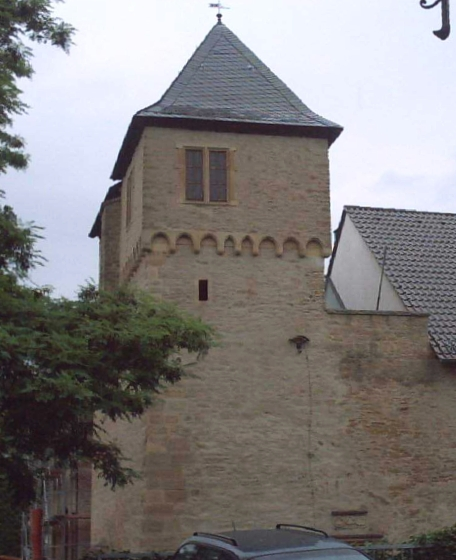 Lauterecken (Pfalz) Turm vom Veldenzer Schloß